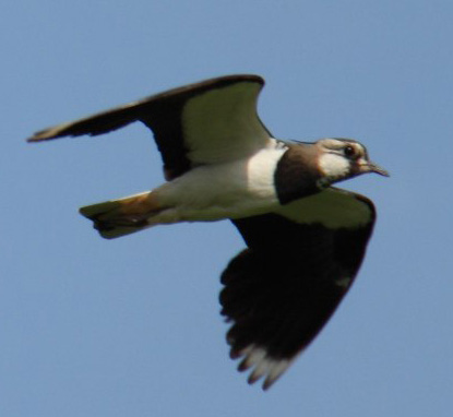 (Vanellus vanellus) - Chibis in Russia (Pulkovo, near St-Petersburg)